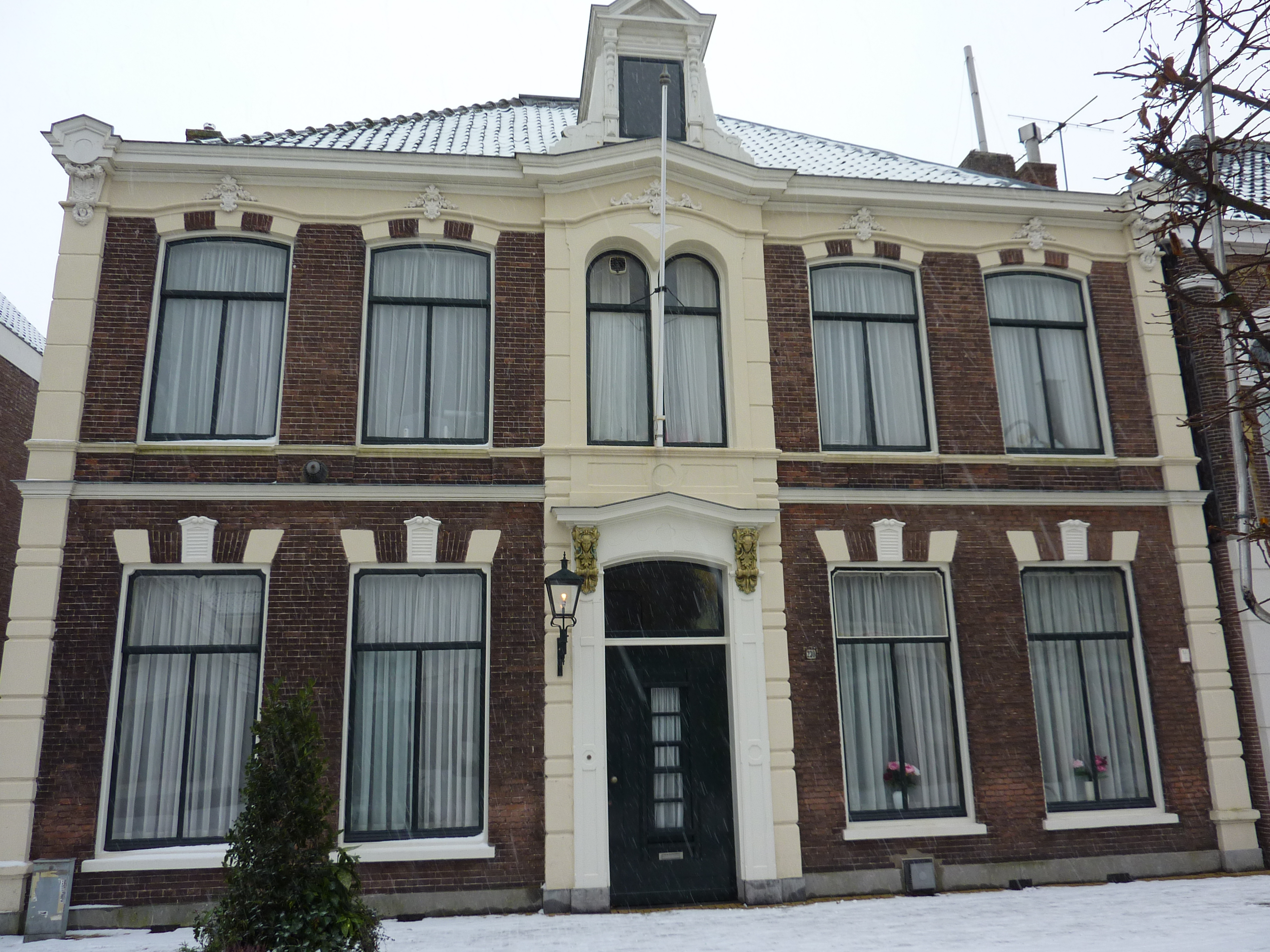 Sassenheim, Hoofdstraat 230, herenhuis